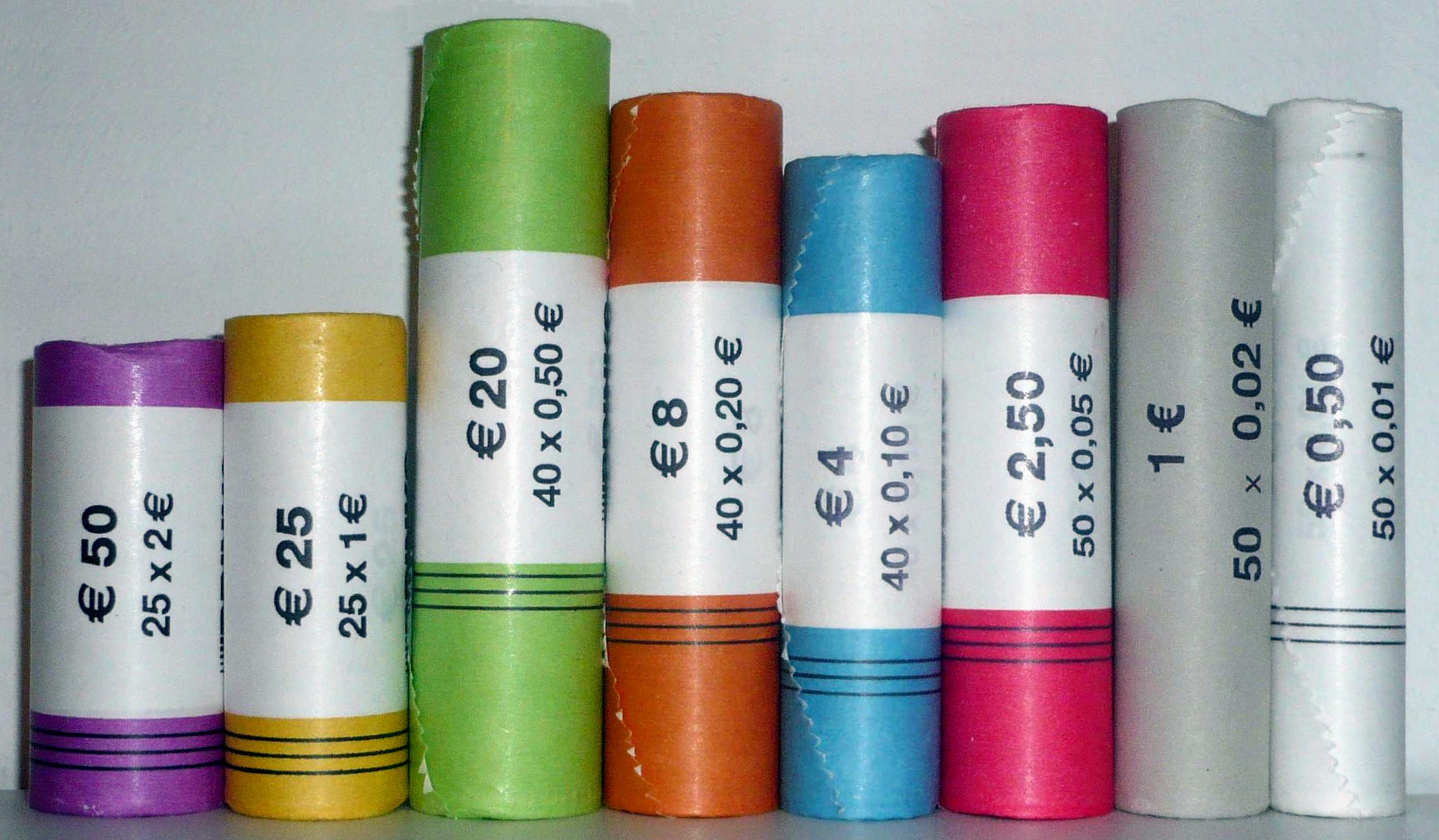 8 Münzrollen